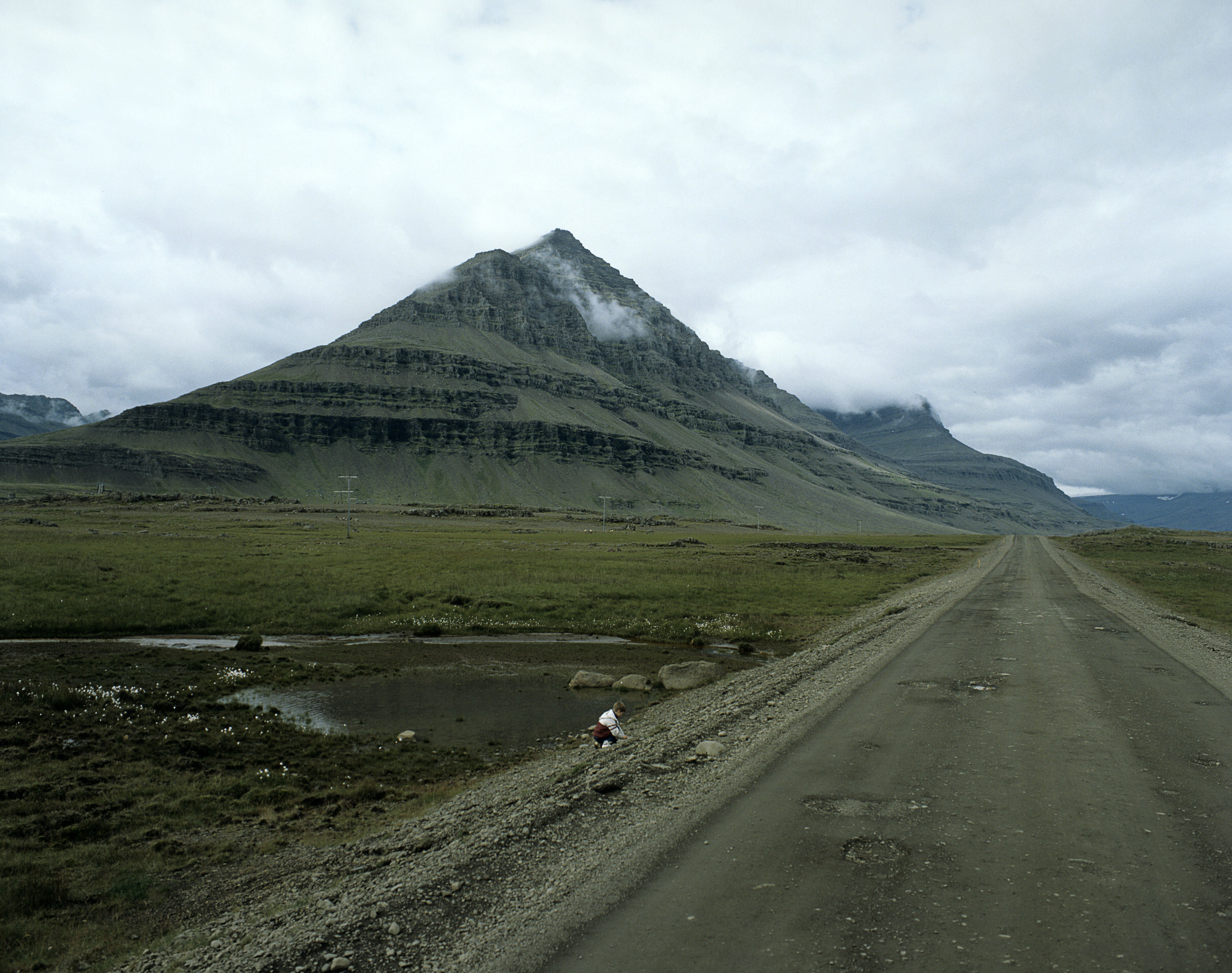 Goðaborg am Berufjörður